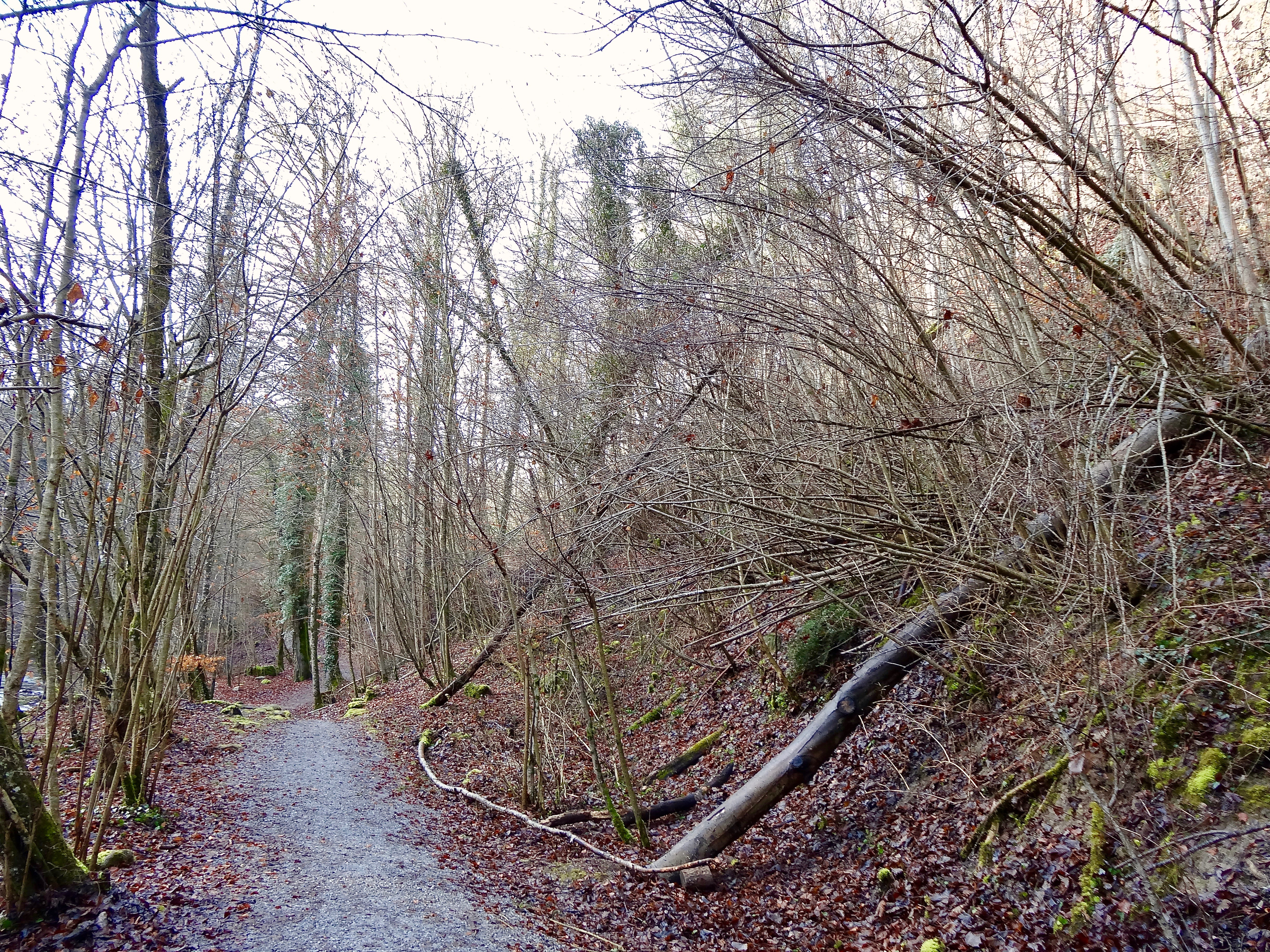 Das Tobel ist ständig in Bewegung: Mergelschichten zersetzen sich durch Wasseraufnahme zu Verwitterungslehm. Die Hänge beginnen, zu kriechen, Rutsche und Rüfen transportieren Holz, Gestein, Erde und Lehm auf den Weg und in den Bach.